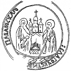 Беларуская (тарашкевіца): Менск (Miensk). Саборная царква Сьвятых Апосталаў Пятра і Паўла, пячатка манастыра